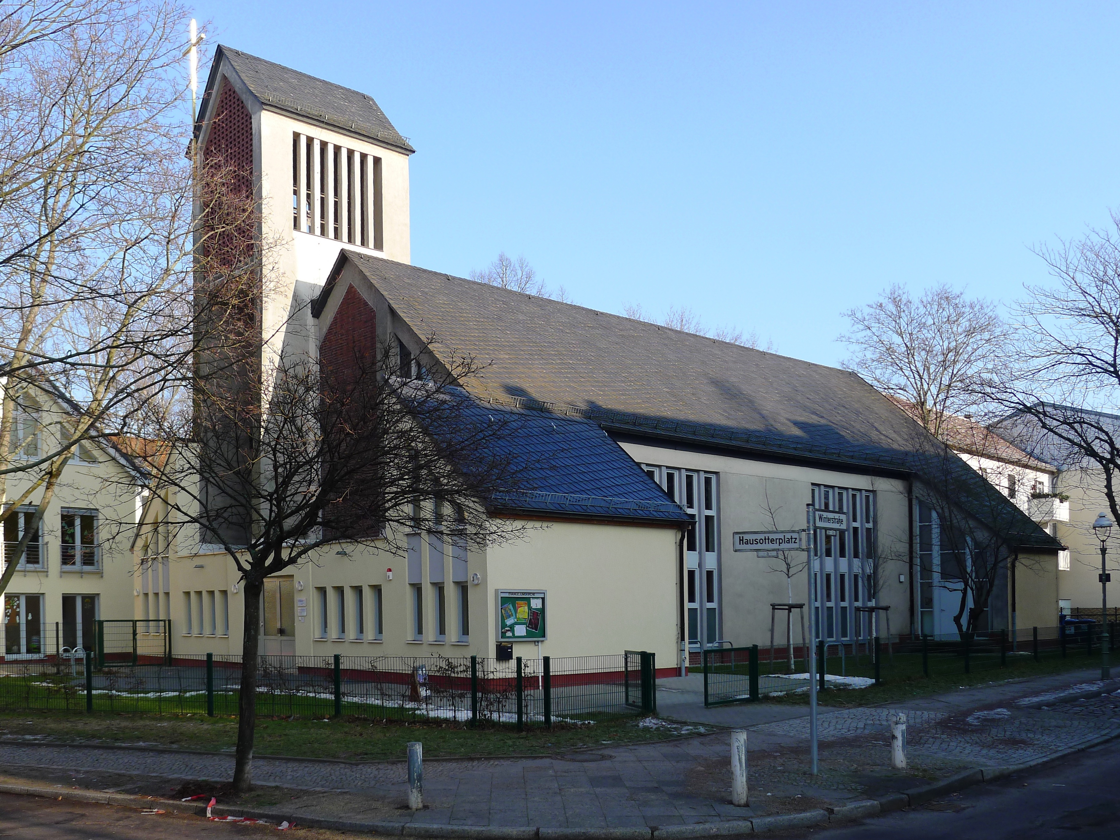 Blick auf die Kirche